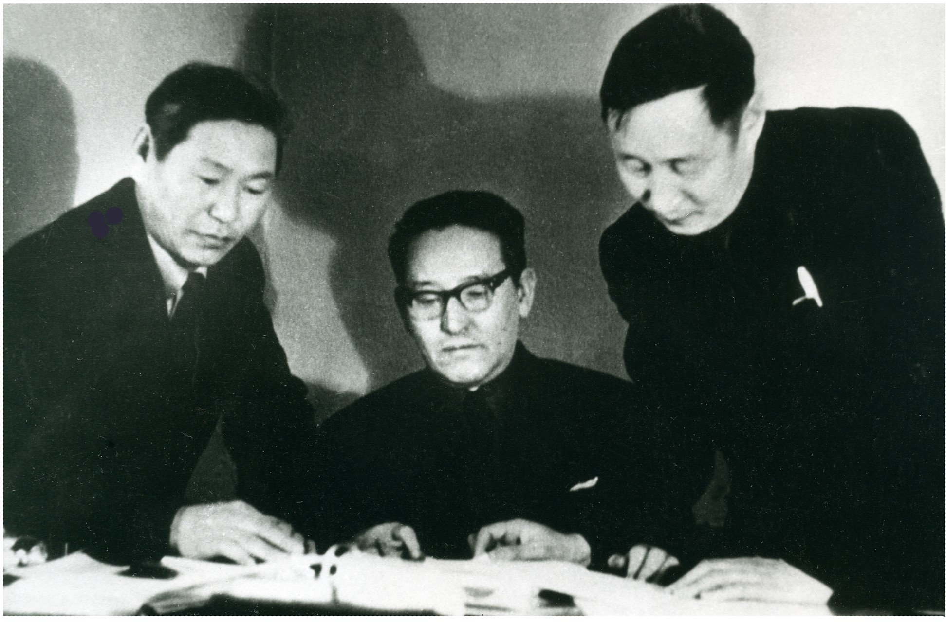 Писатель Лев Габышев в редакции литературного журнала "Хотугу Сулус", 1970